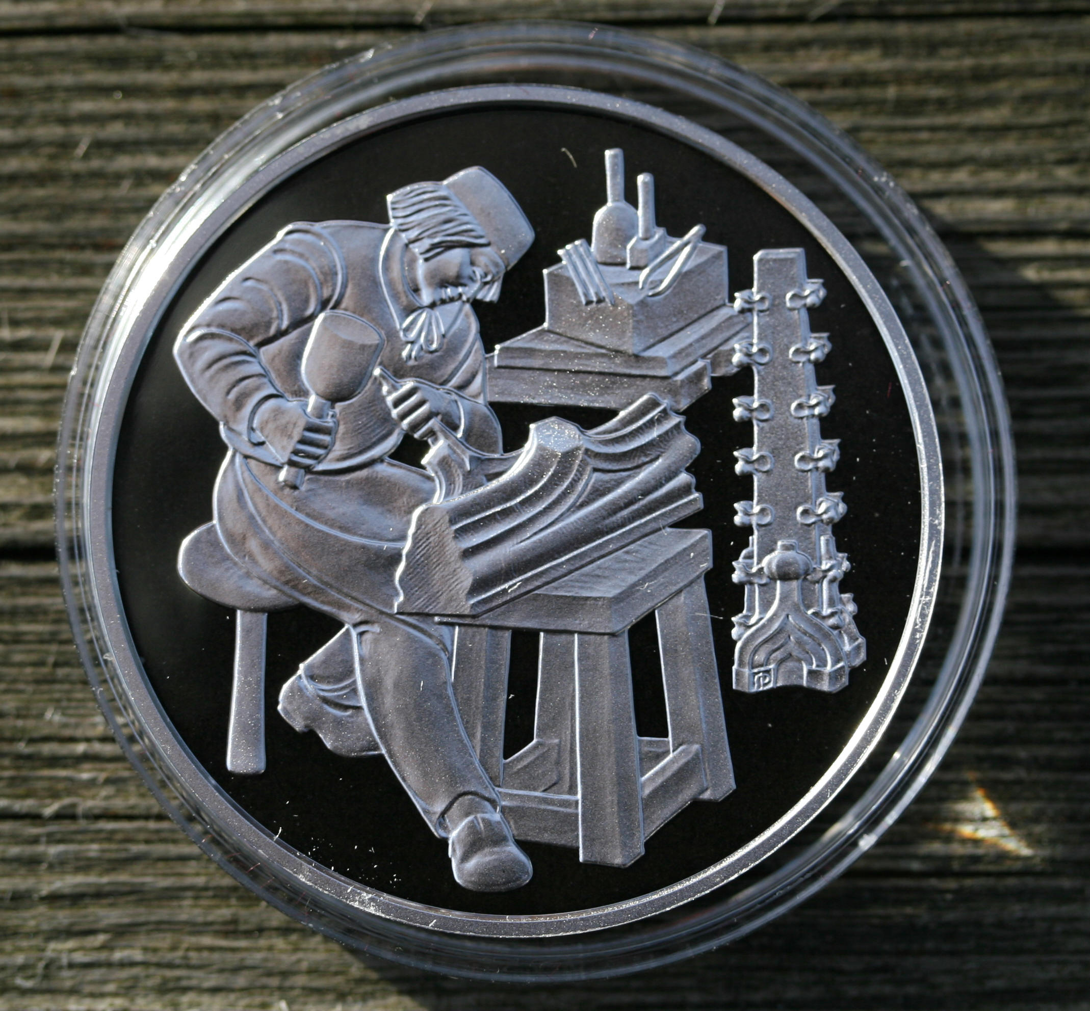 500 Schillingmünze Österreich